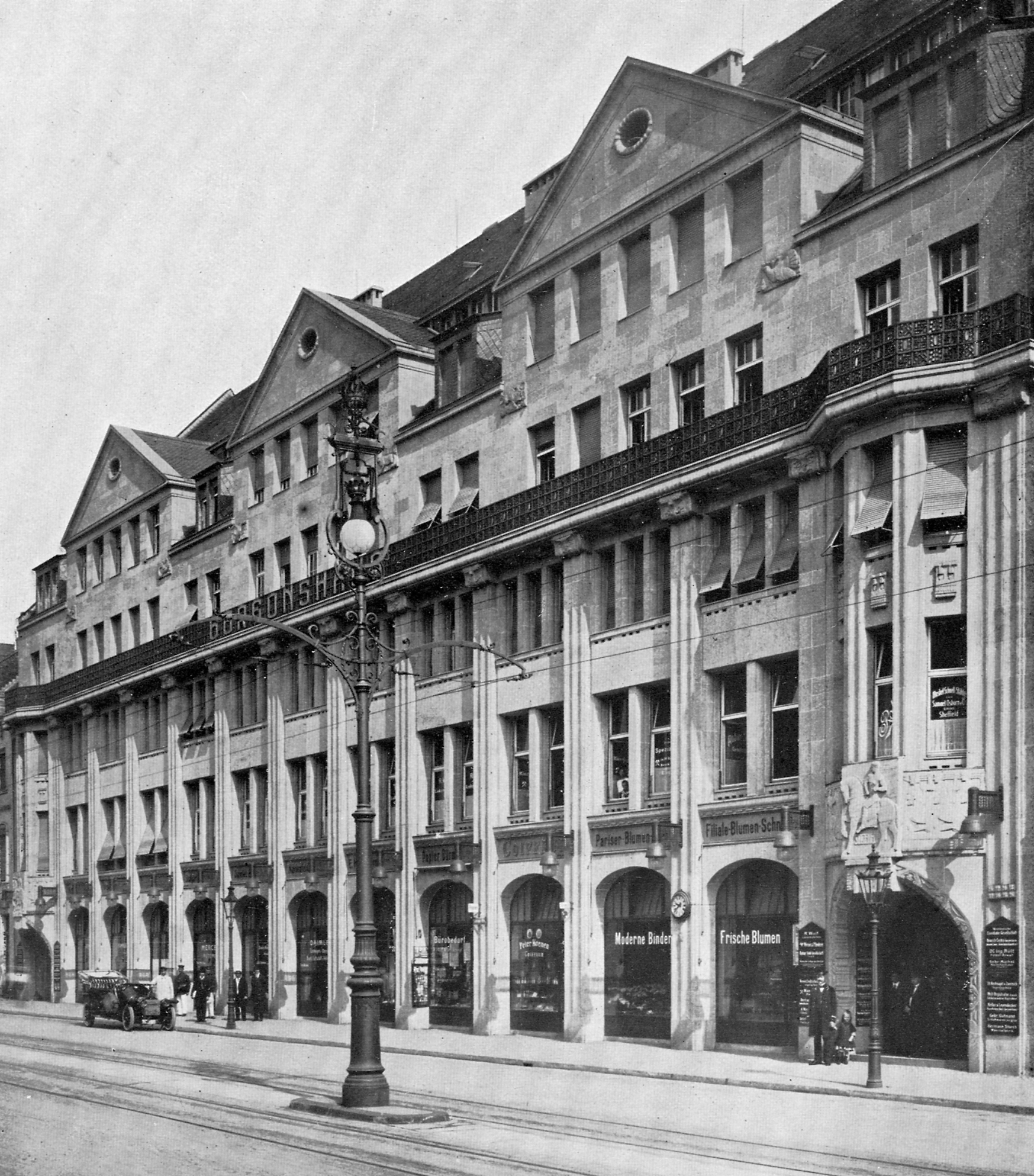 Köln, Gereonshaus, 1910